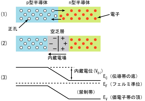 半導体のpn接合の簡易な説明図